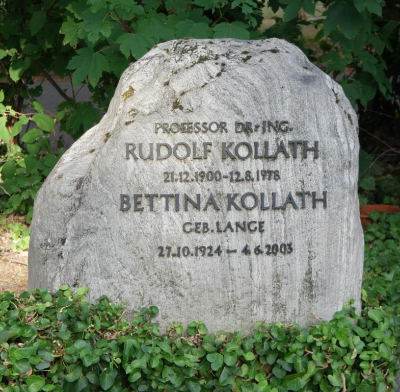 Grab des Experimentalphysikers Rudolf Kollath, 1900-1978, auf dem Hauptfriedhof in Mainz